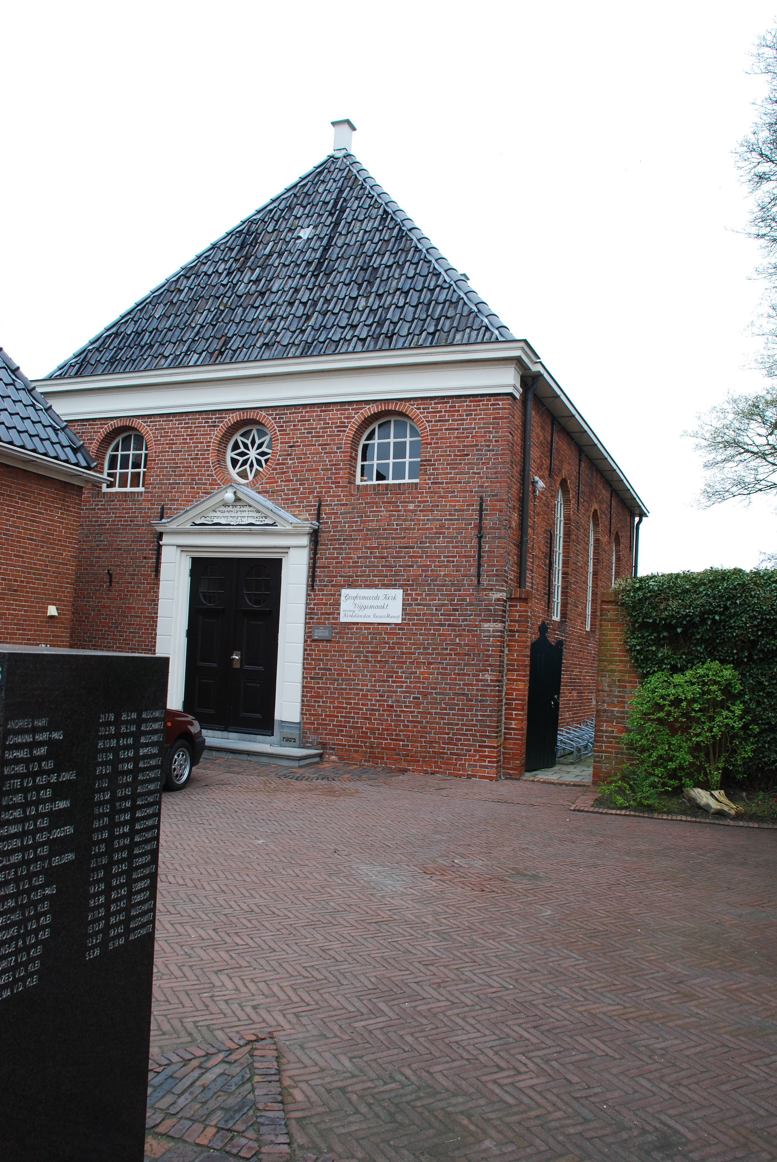 Synagoge van Appingedam, na de oorlog de Gereformeerde Kerk (Vrijgemaakt)